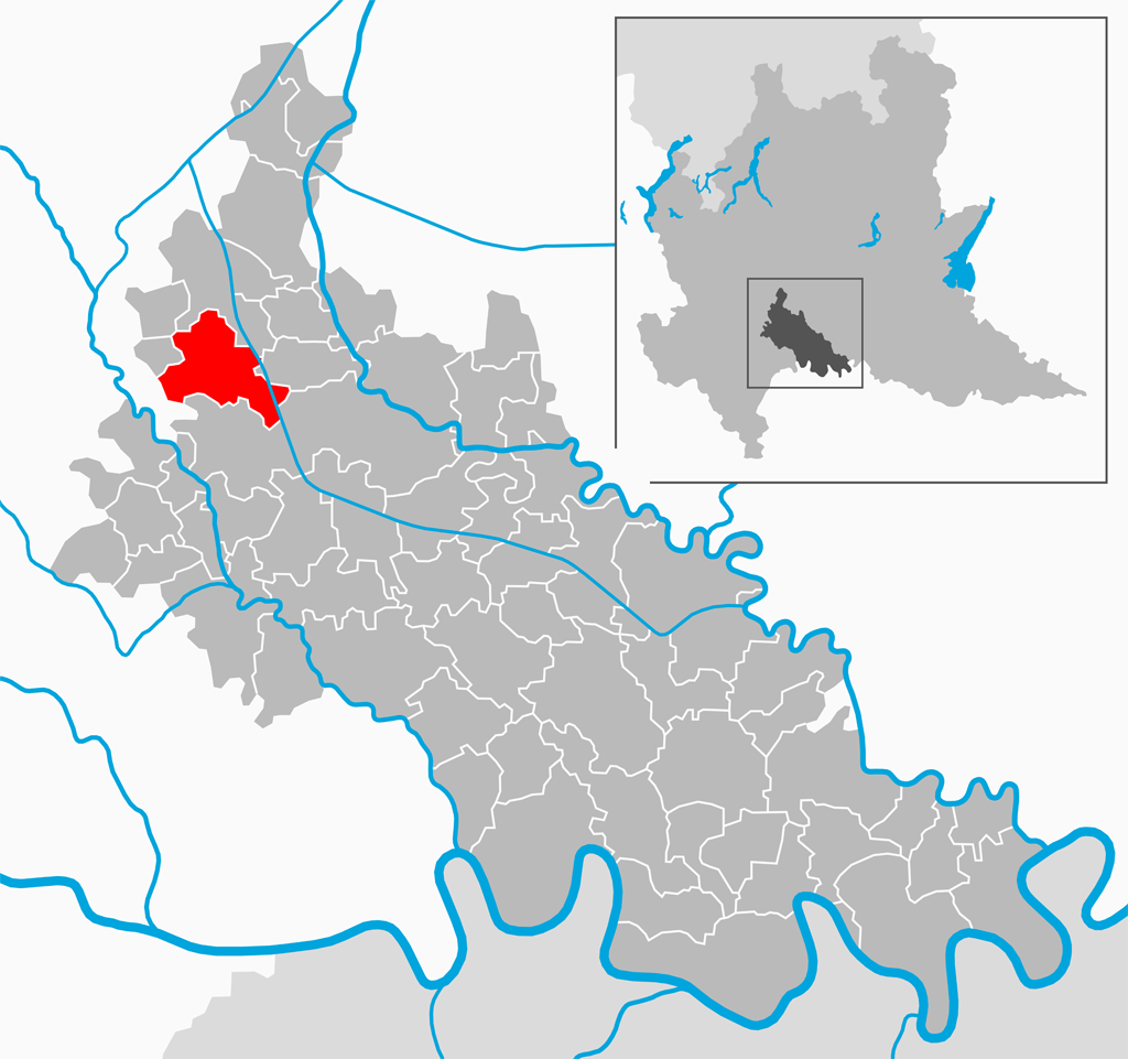 Il comune di Tavazzano con Villavesco nella provincia di Lodi